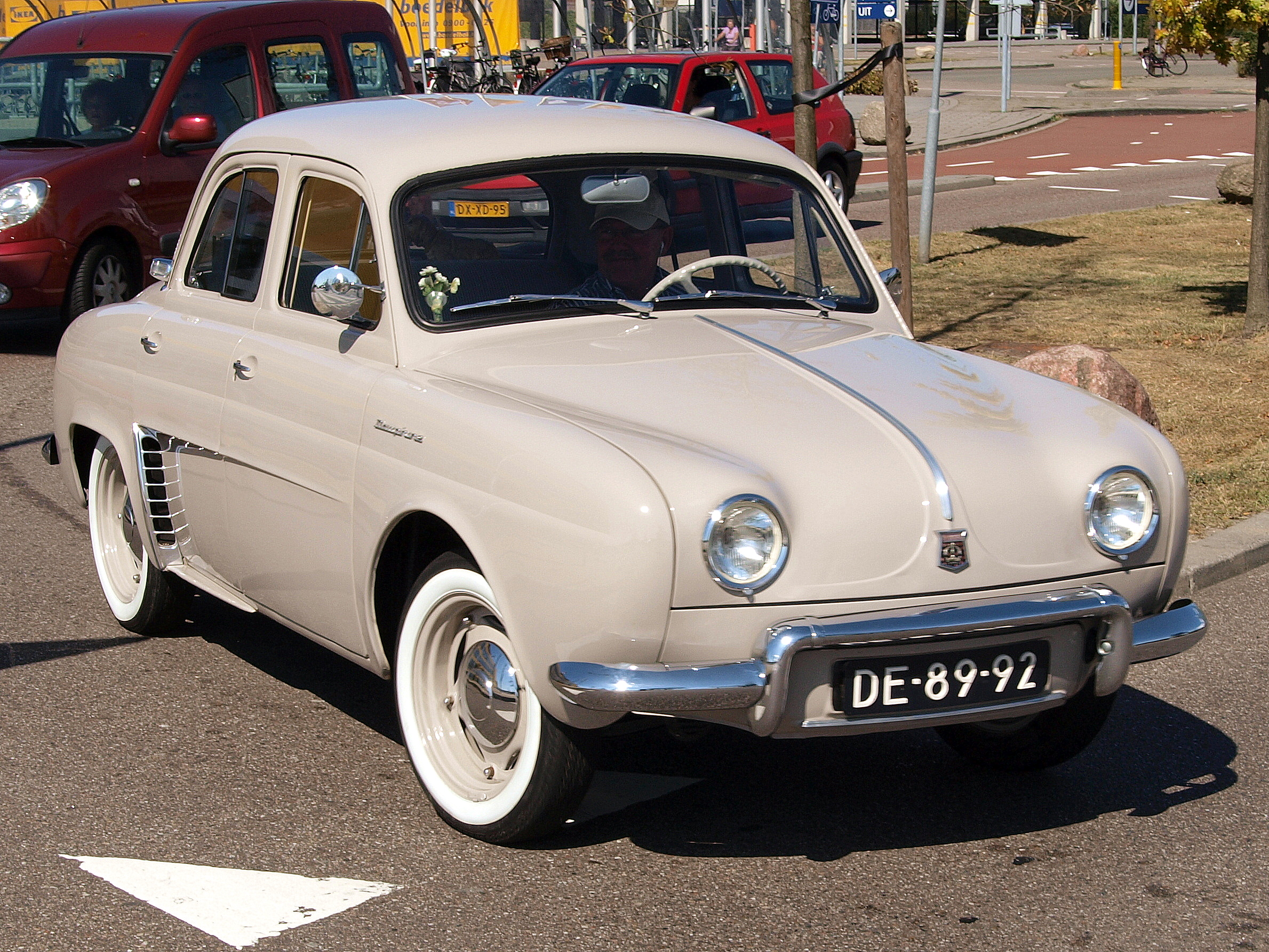 Renault Dauphine DE-89-92